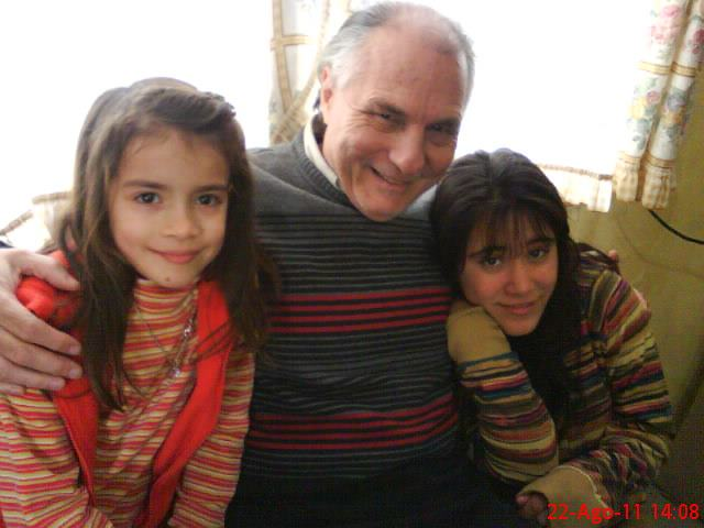 El escritor junto a sus nietas.